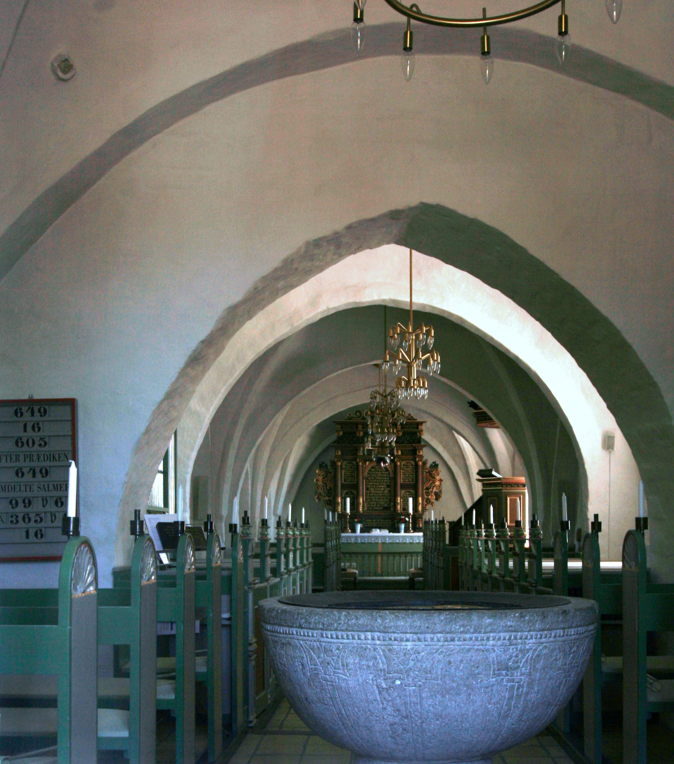 Ølsemagle Kirke, near Køge, Denmark. Interior from west.